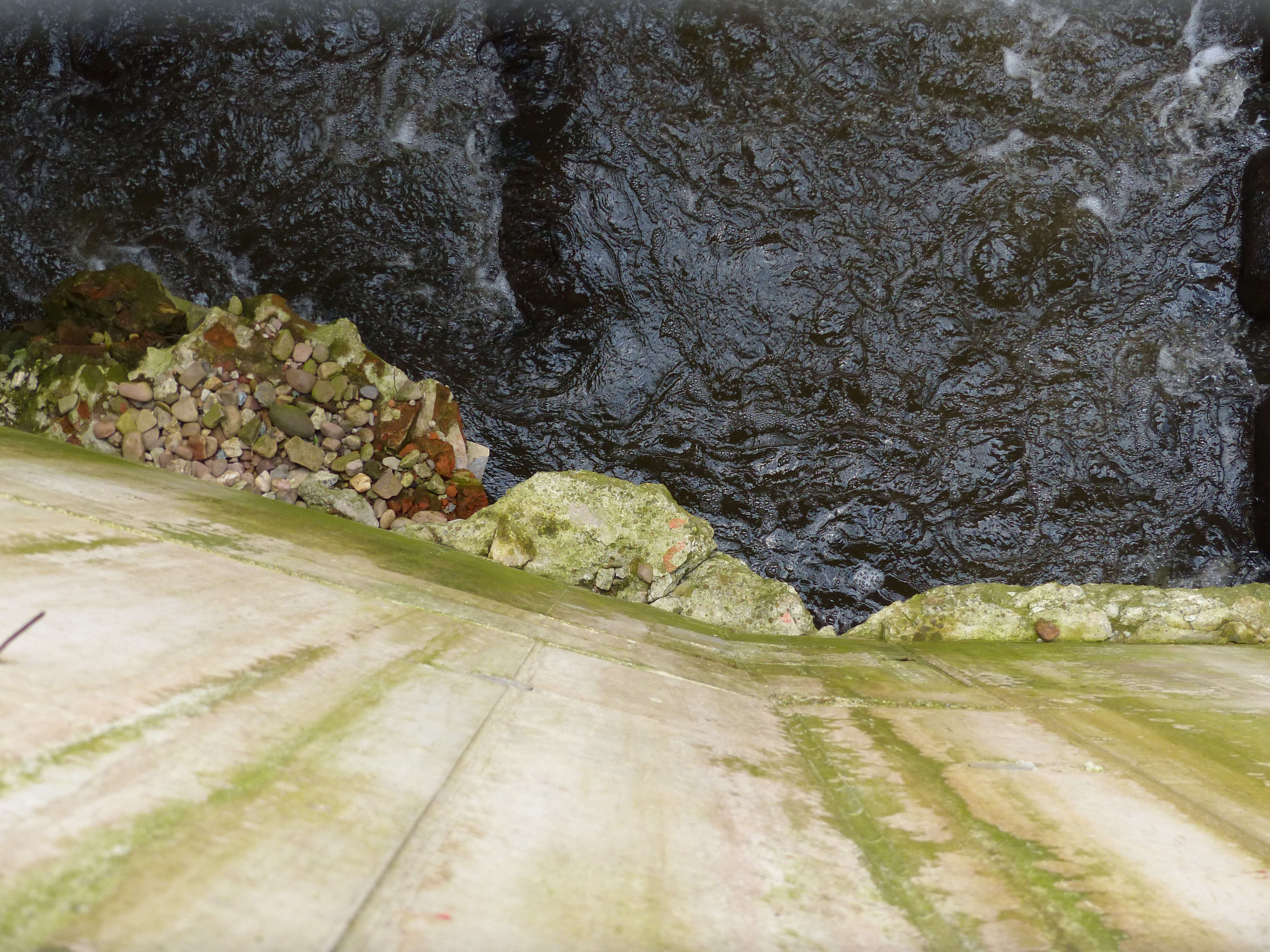 Triebwasserkanal des neuen Wasserkraftwerks am Bremer Weserwehr